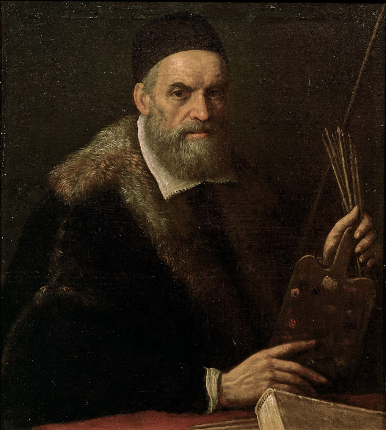 portrait in later age